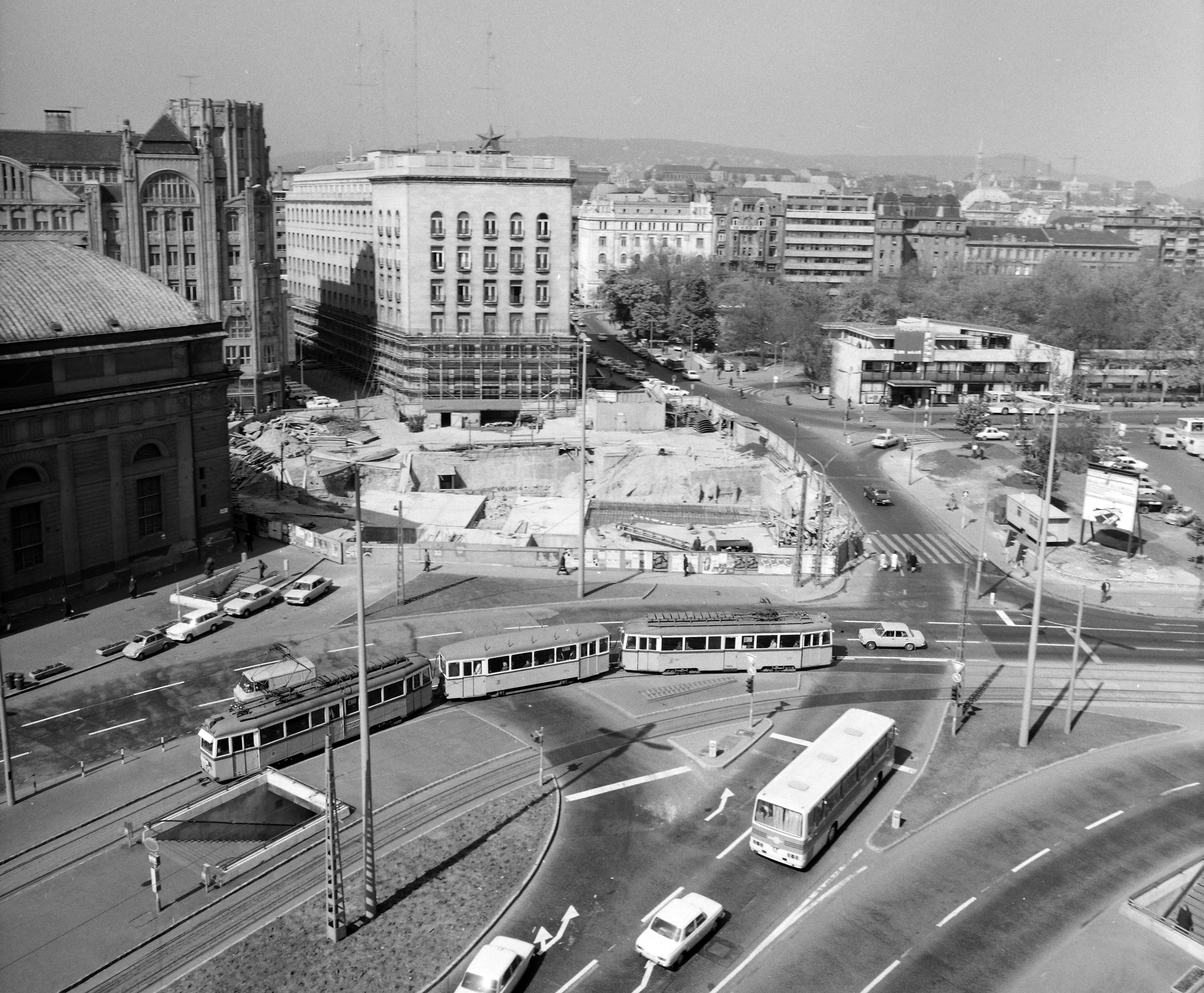 Deák Ferenc tér a Király (Majakovszkij) utca felől az Erzsébet (Engels) tér felé nézve az aluljáró építése idején. Location: Hungary, Budapest V., Budapest VI. Tags: Budapest Title: Deák Ferenc tér a Király (Majakovszkij) utca felől az Erzsébet (Engels) tér felé nézve az aluljáró építése idején.